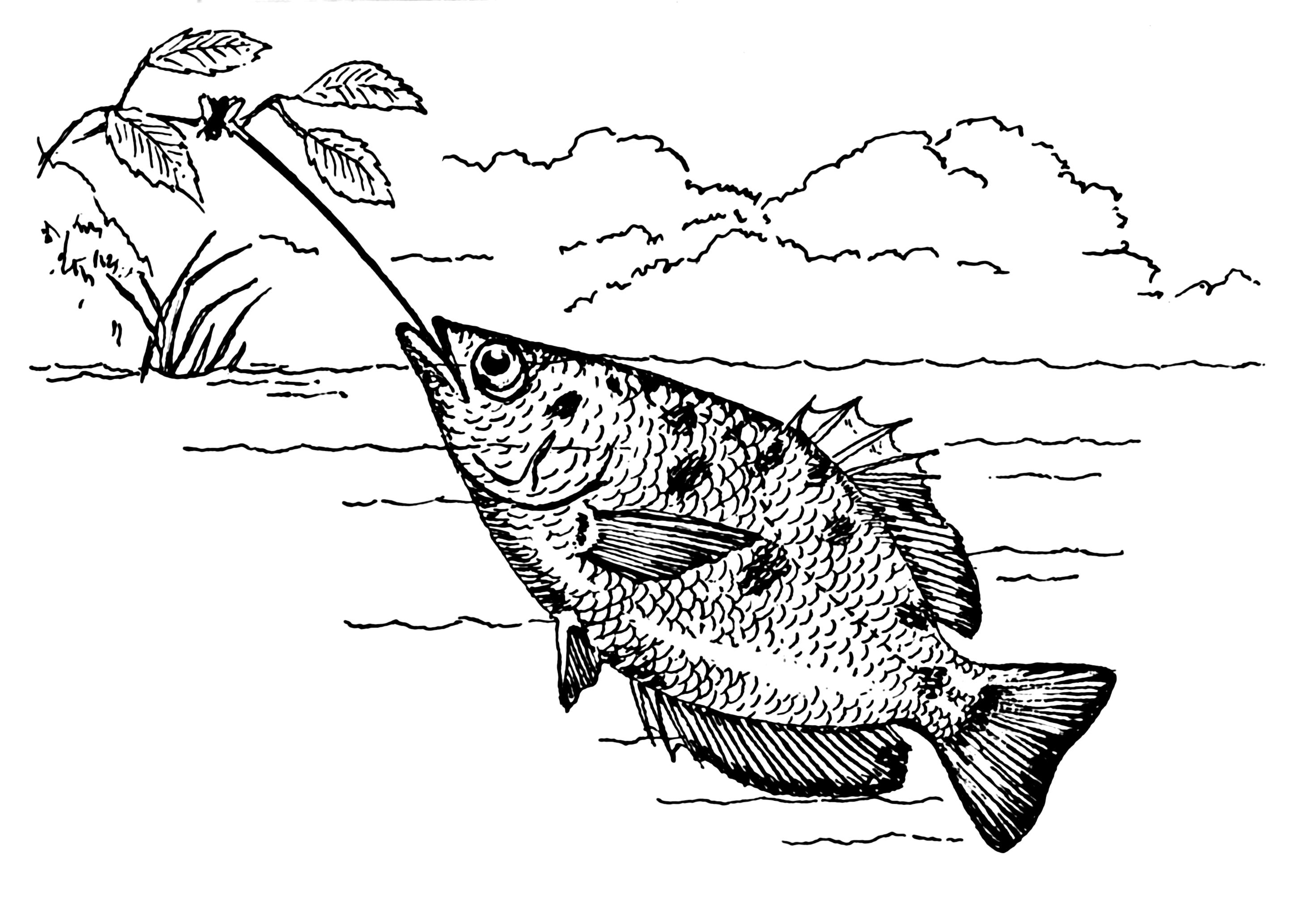 Archerfish